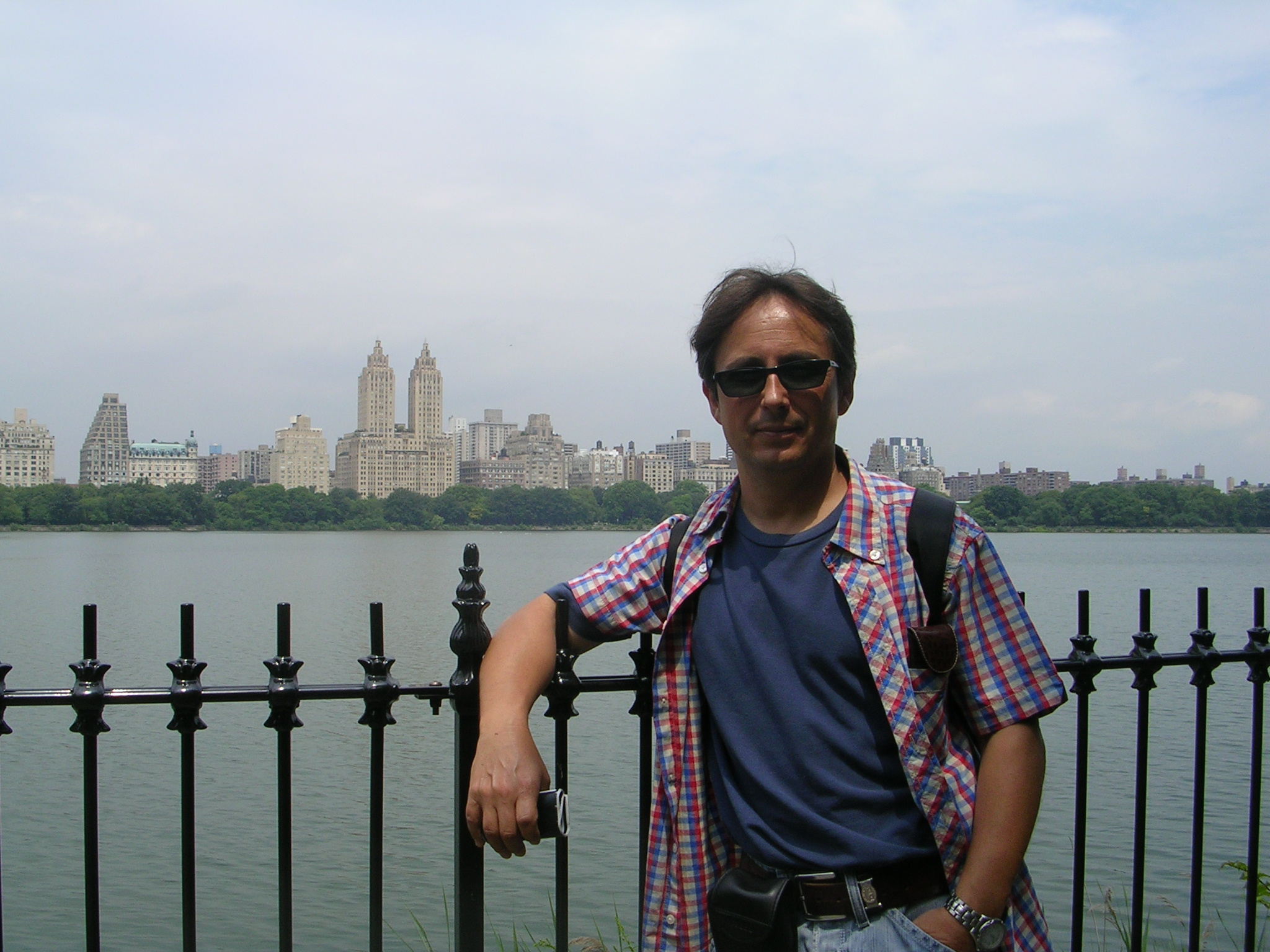 Iñaki Pinedo - Rodaje en New York (2009) de Los Otros Guernicas